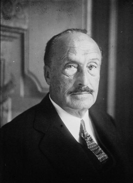 Comte de Fels